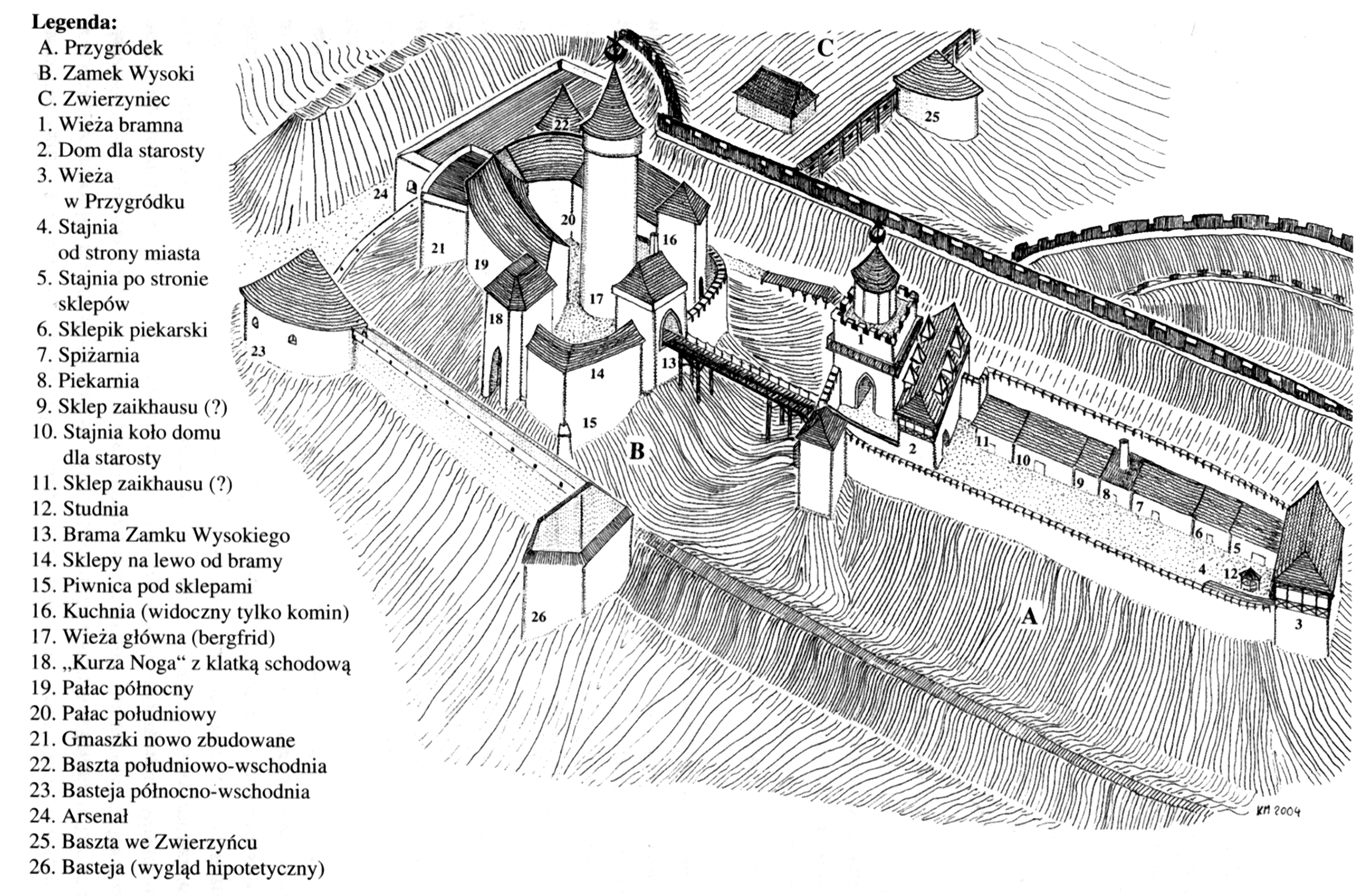 Zamek tarnowski w XVII w. Układ przestrzenny (rys. K. Moskal)